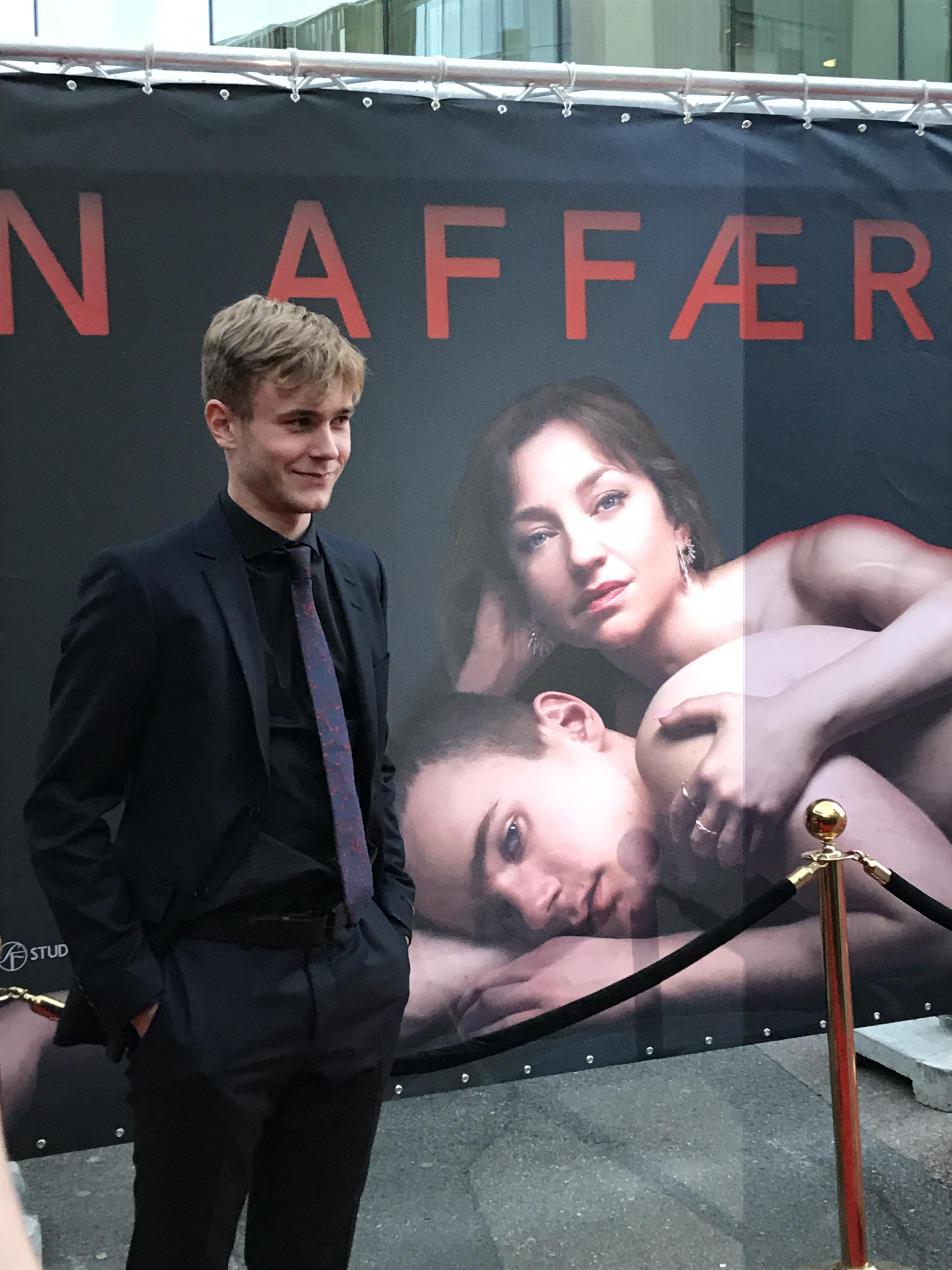 Tarjei på premiären av En affære i Oslo, 5 Oktober 2018. (Bild tagen av mig)